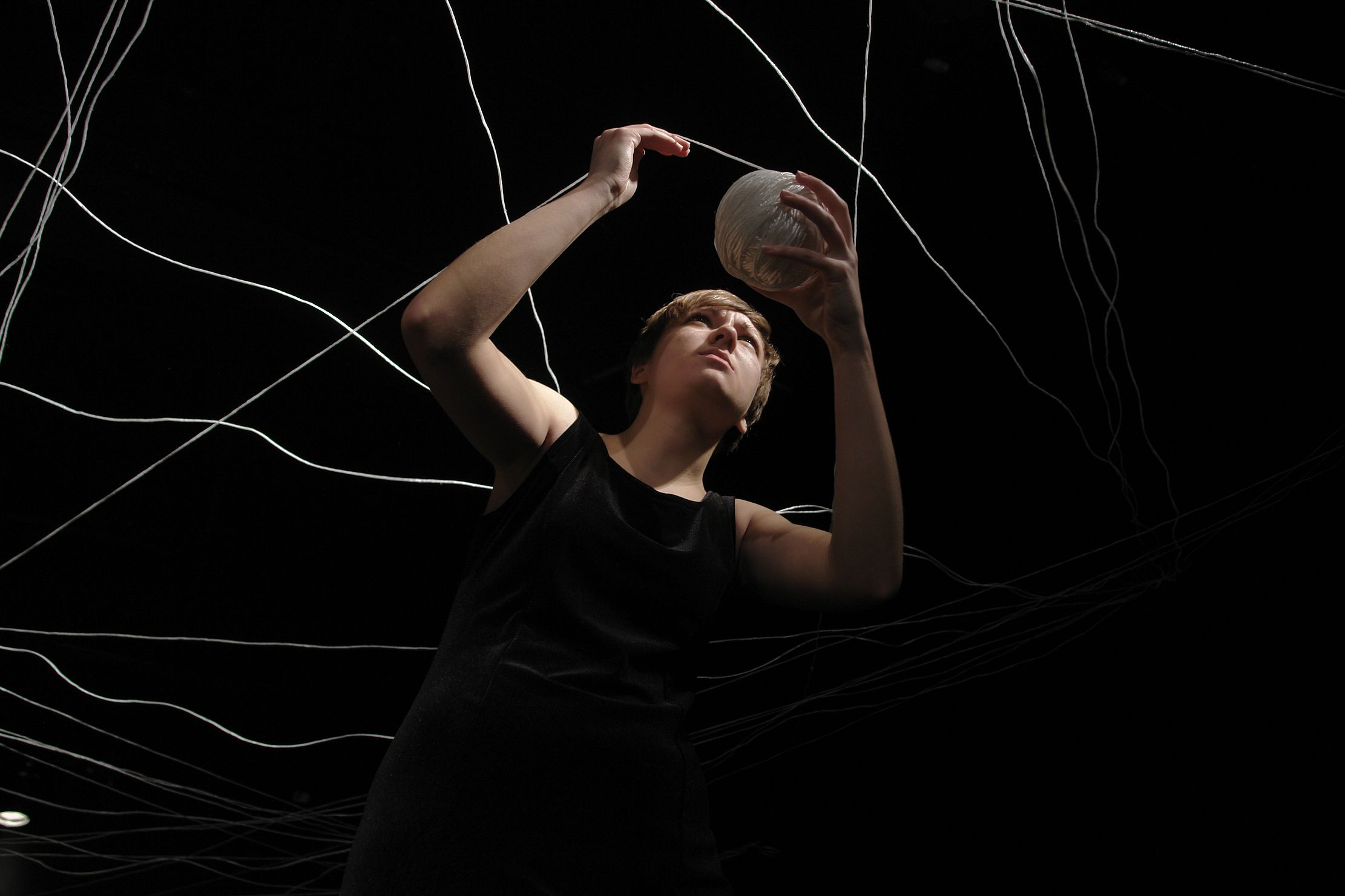 Spektakl nowosolskiego teatru Terminus A Quo "Pieśń Awrejmełe" na podst. poematu Eugena Werbera. Na zdjęciu aktorka Marta Chorążyk